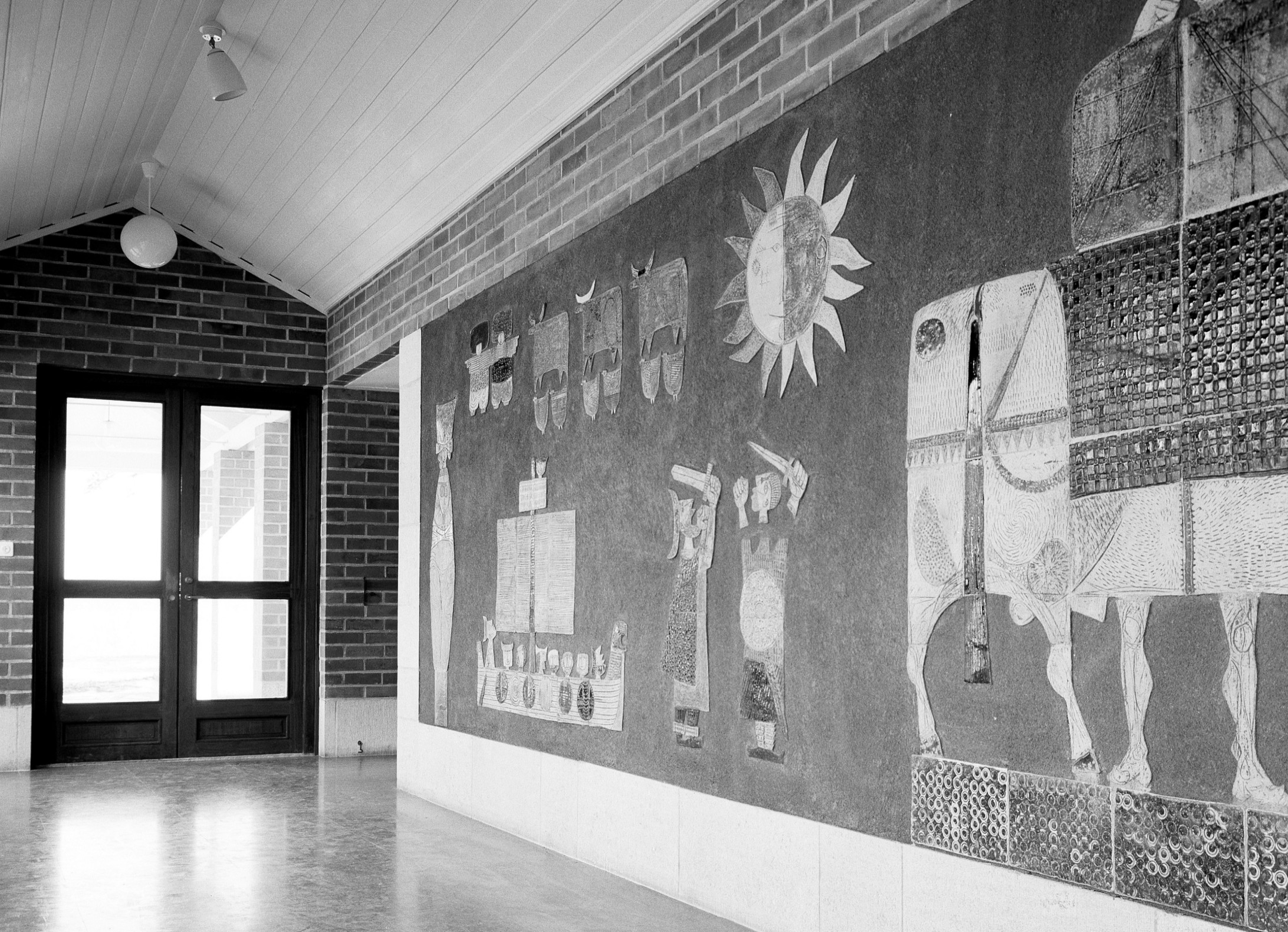 Väggfris av Stig Lindberg på Vår Gård